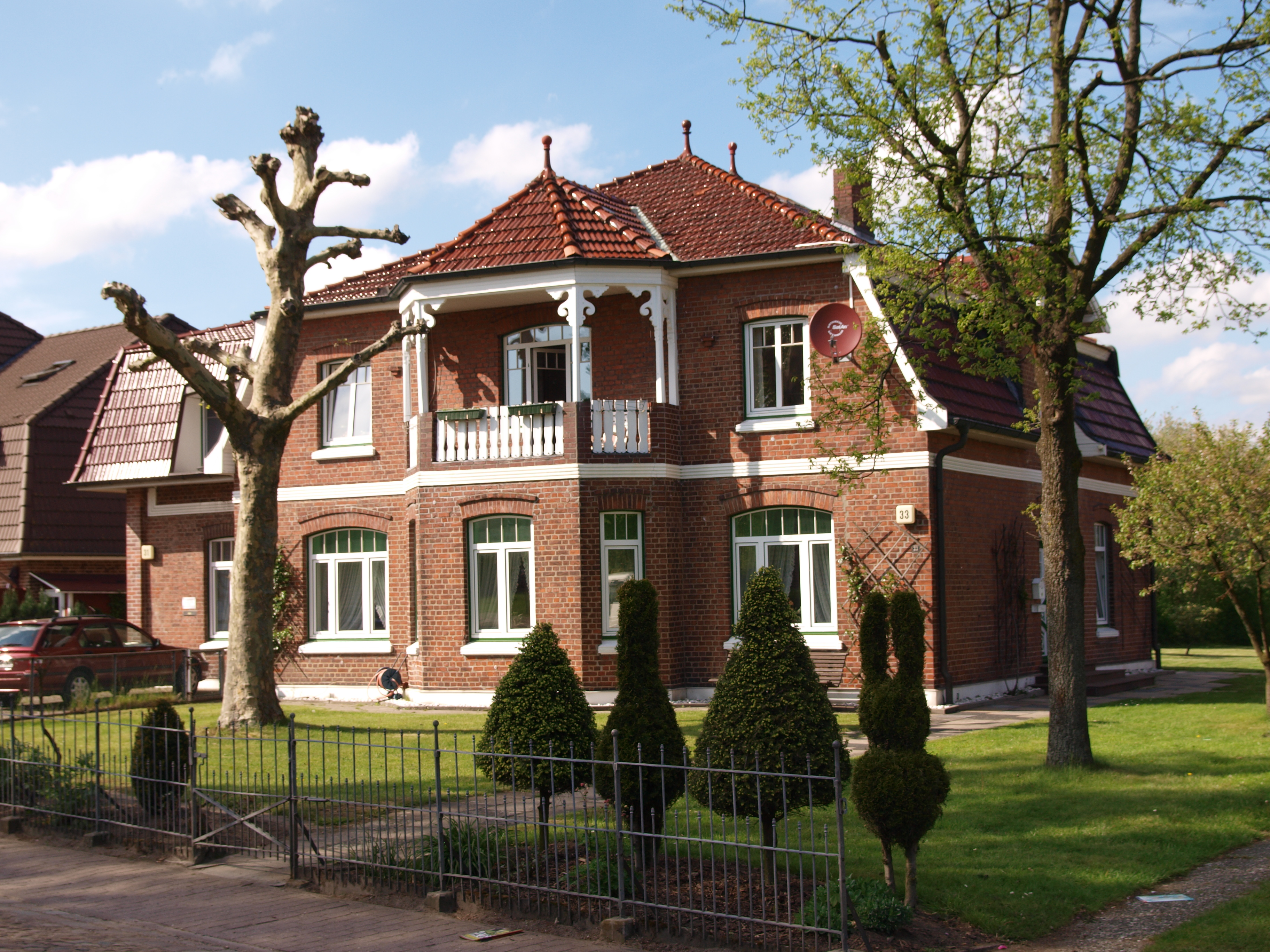 Wohnhaus (und Wirtschaftsgebäude). Nedderstraße 33, Schenefeld (Kreis Pinneberg) Deutschland. Kulturdenkmal von öffentlichem Interesse.